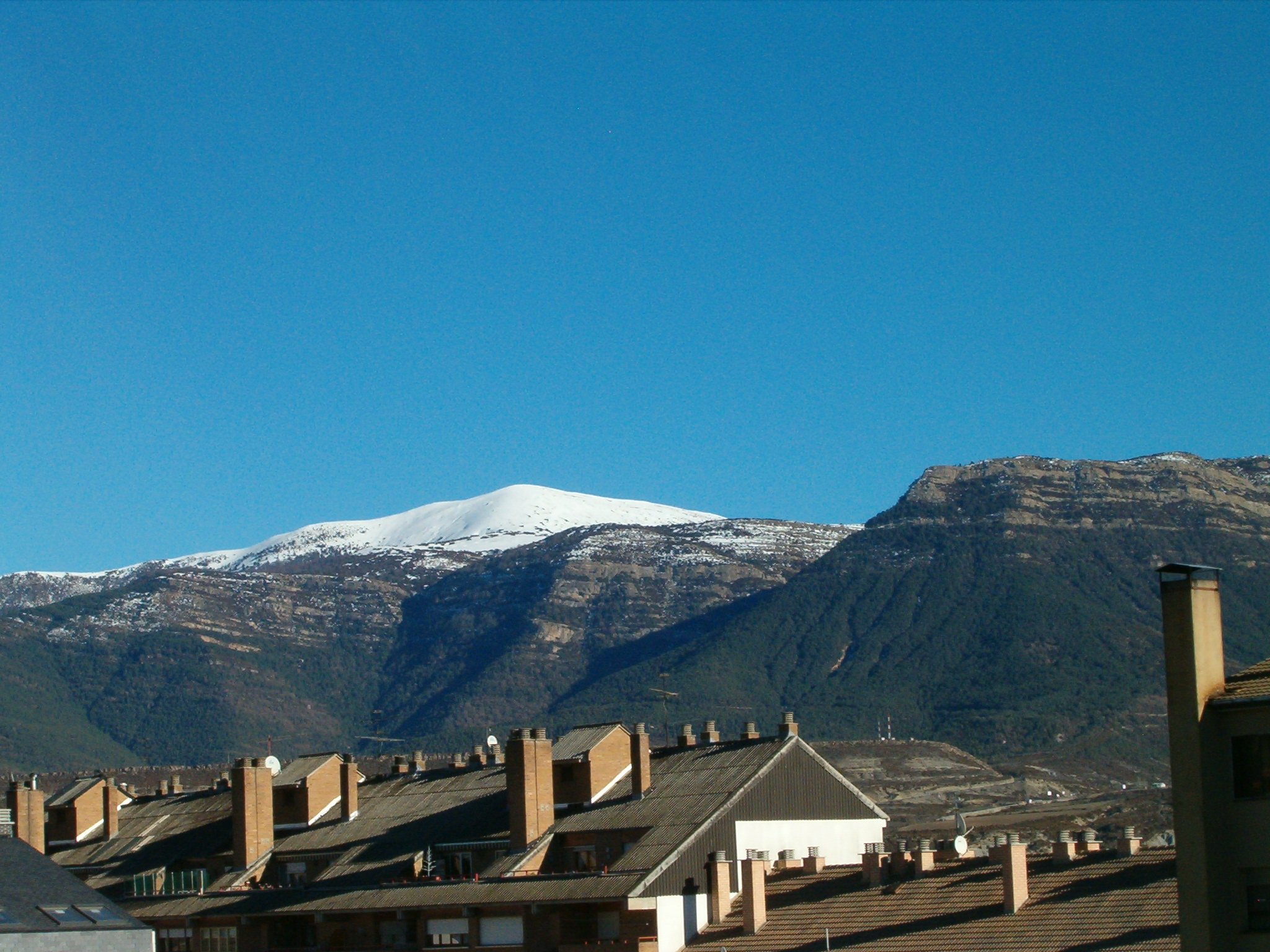 Santa Orosia y Oturia vistos desde Sabiñánigo